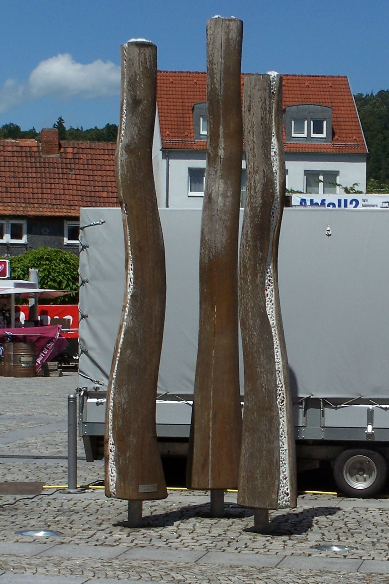 Skulptur am Nappenplatz in Bad Salzungen. Der Künstler versuchte seine Inspiration zum Wort "Salzstock" umzusetzen.